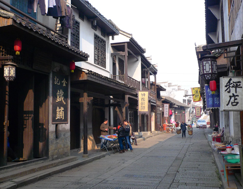 望城靖港古镇